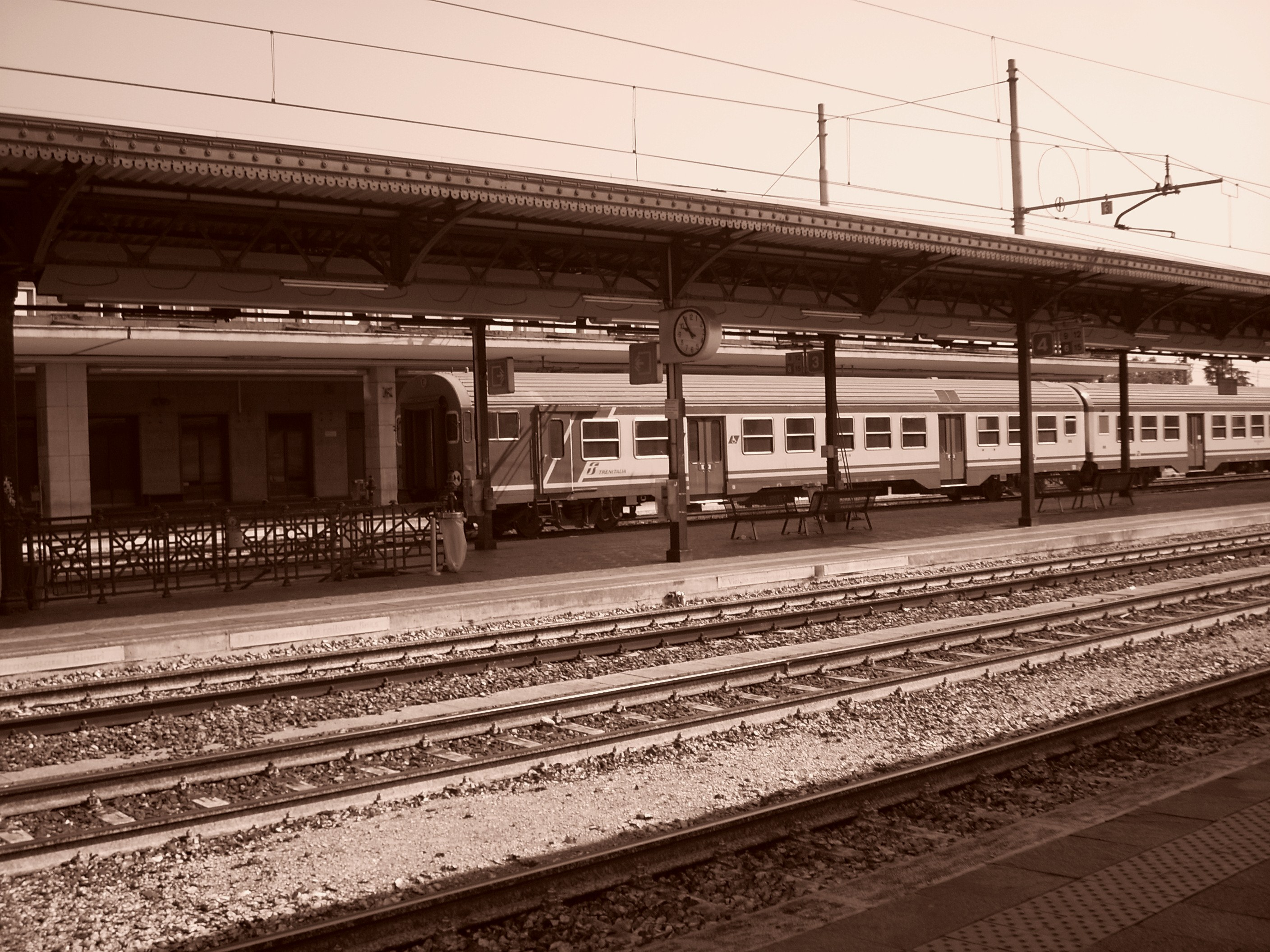 Verona Porta Nuova Fonte = opera propria Data = 16 giugno 2009 Autore = Gio 2000